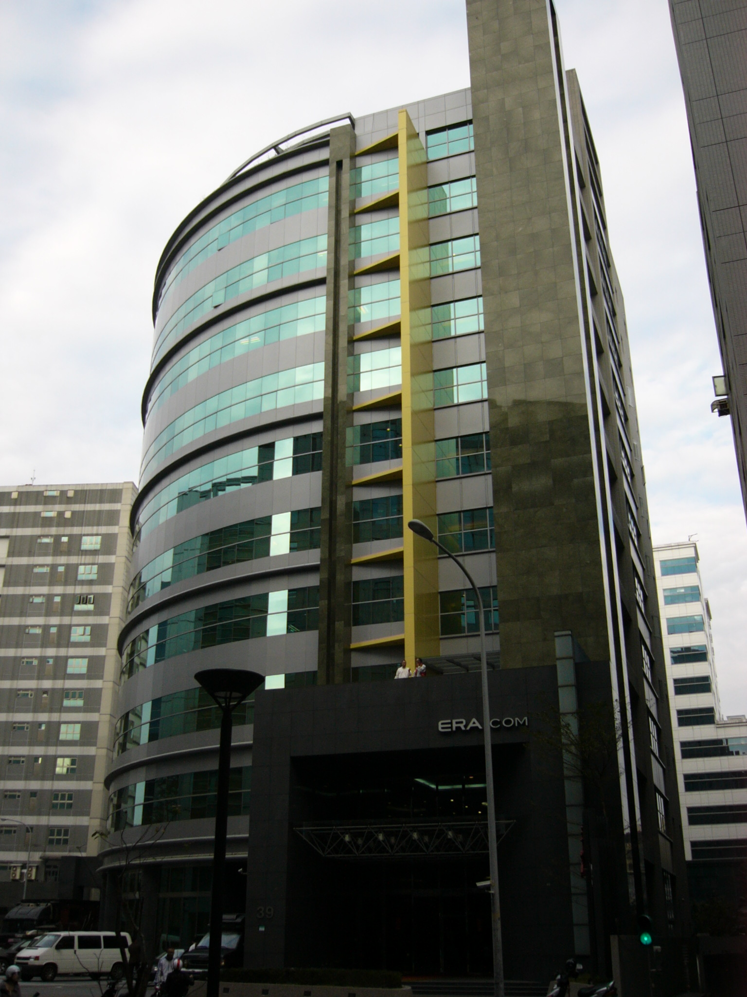 年代電視總部，位於臺北市內湖區瑞湖街39號。